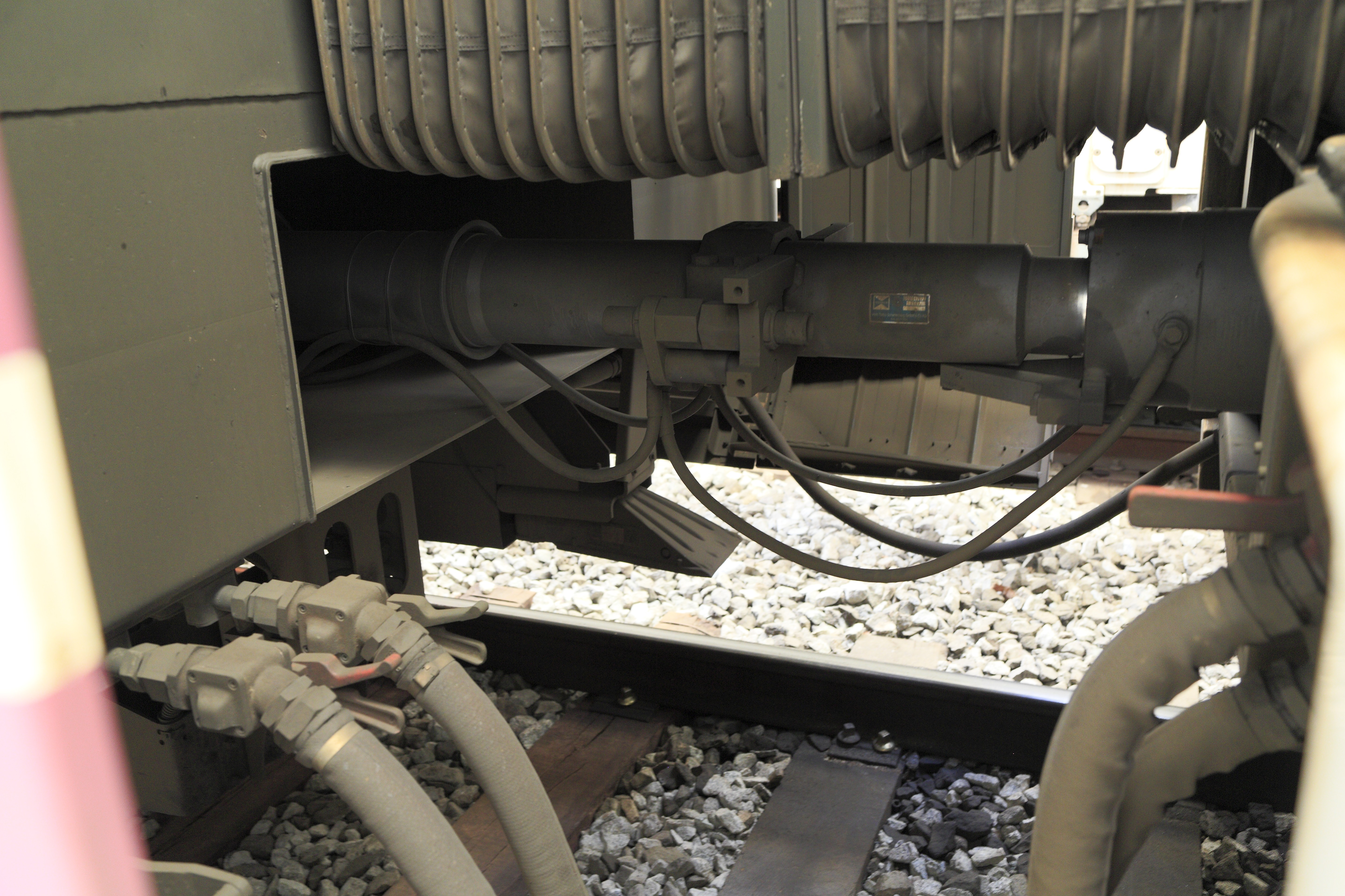 zwischen Triebkopf (links) und Endwagen des Wagenzuges (rechts). Das Kopfstück des Triebkopfes ist im Gegensatz zu denen des Endwagens nicht auf den Einbau von Seitenpuffern und Schraubenkupplung ausgelegt. Die mechanische sowie die Leitungskupplungen sind asymmetrisch ausgelegt, die Triebköpfe sind jedoch tauschbar.